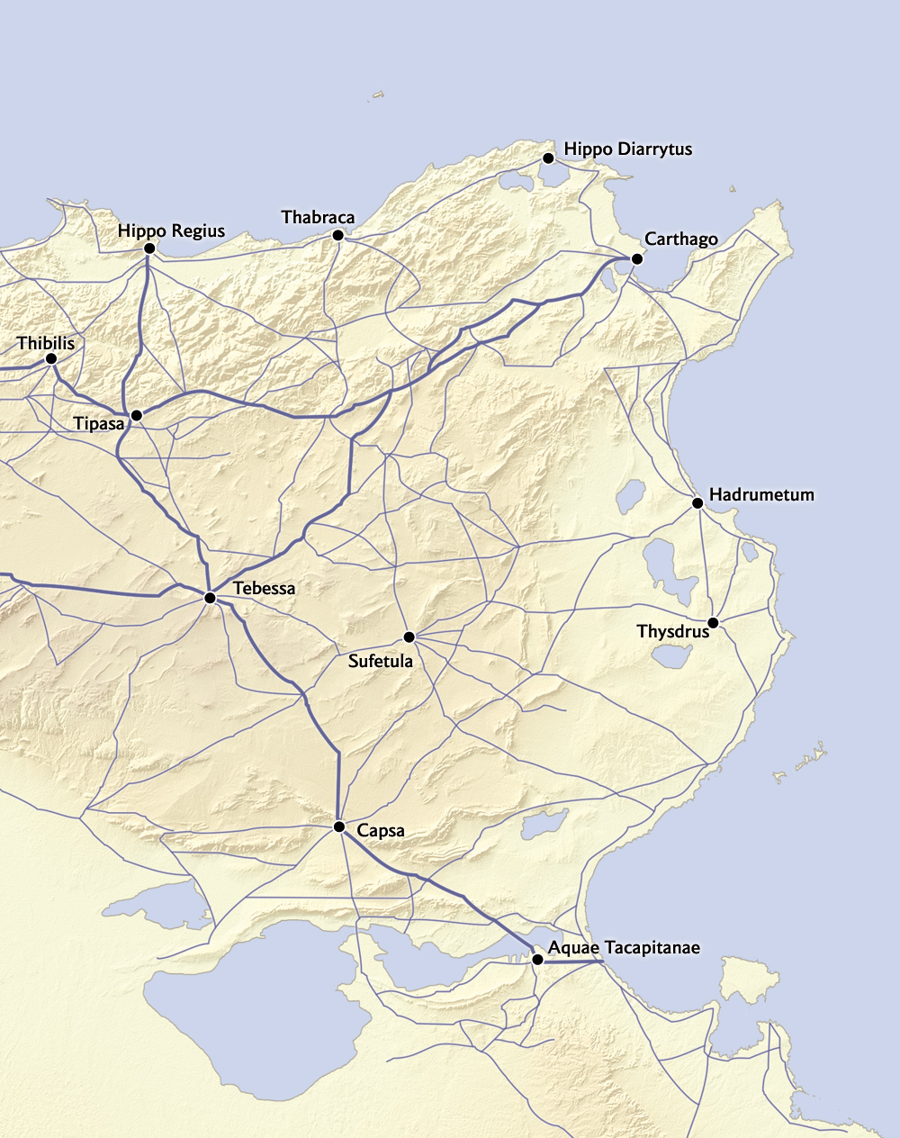 Carte des voies romaines en Afrique proconsulaire